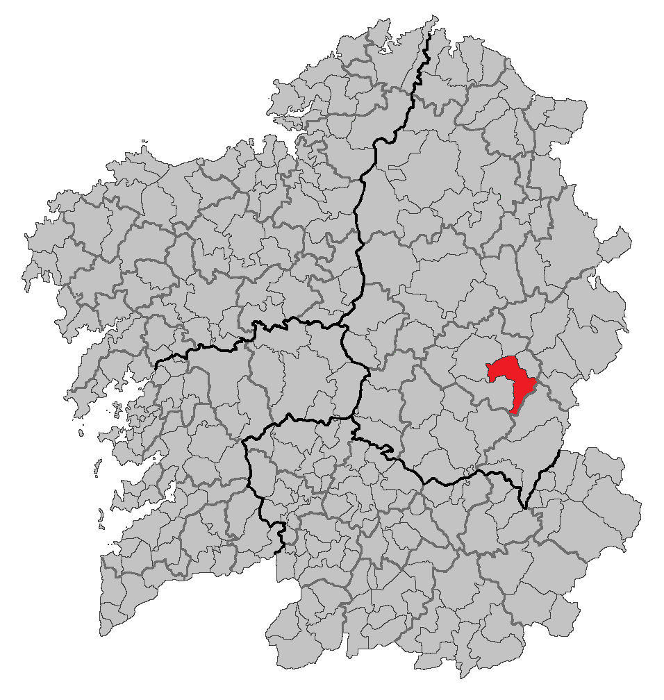 Mapa coa localización do concello de Samos.